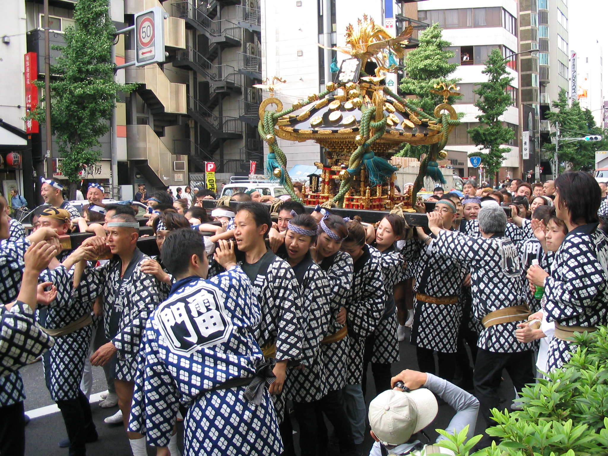 Mikoshi (portable Shinto shrine) at Asakusa Sanja Festival, Asakusa, Tokyo, Japan